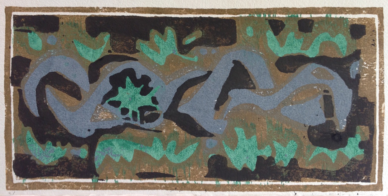 Abstrakt litografi av Arne E. Holm